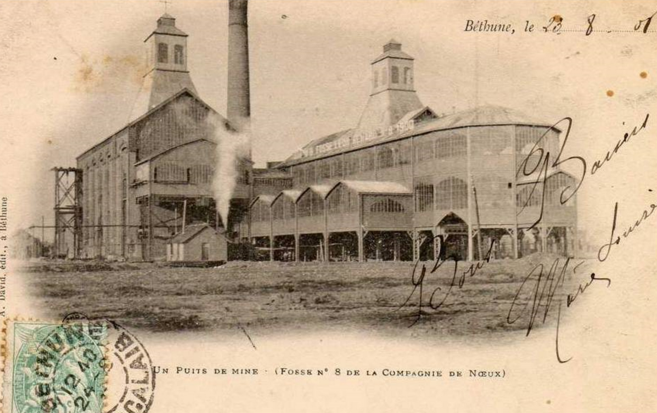 La fosse n° 8 - 8 bis de la Compagnie des mines de Nœux était un charbonnage du bassin minier du Nord-Pas-de-Calais constitué de deux puits situé à Verquin, Pas-de-Calais, Nord-Pas-de-Calais, France.